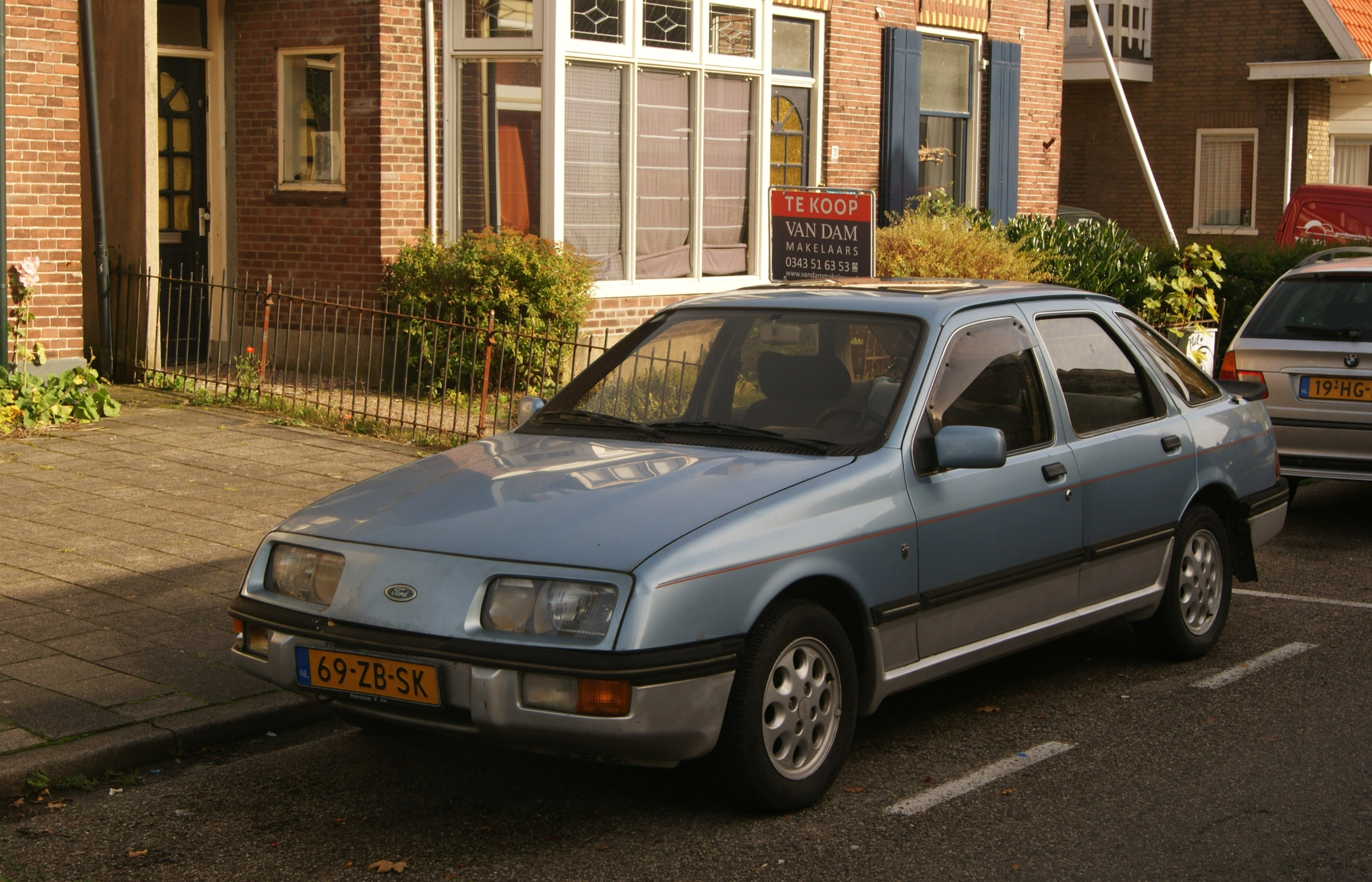 69-ZB-SK